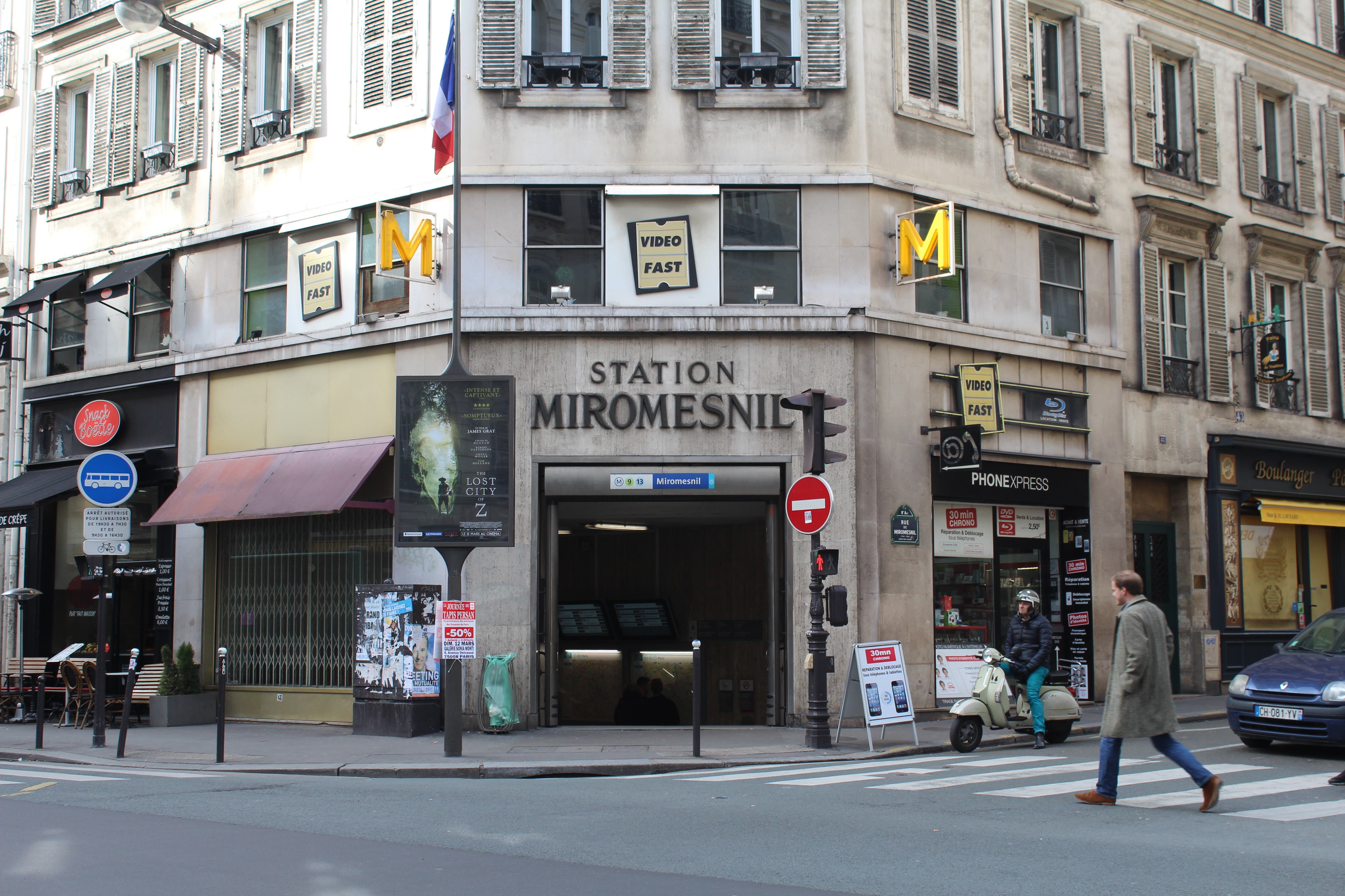 Entrée de la station de métro Miromesnil à Paris.